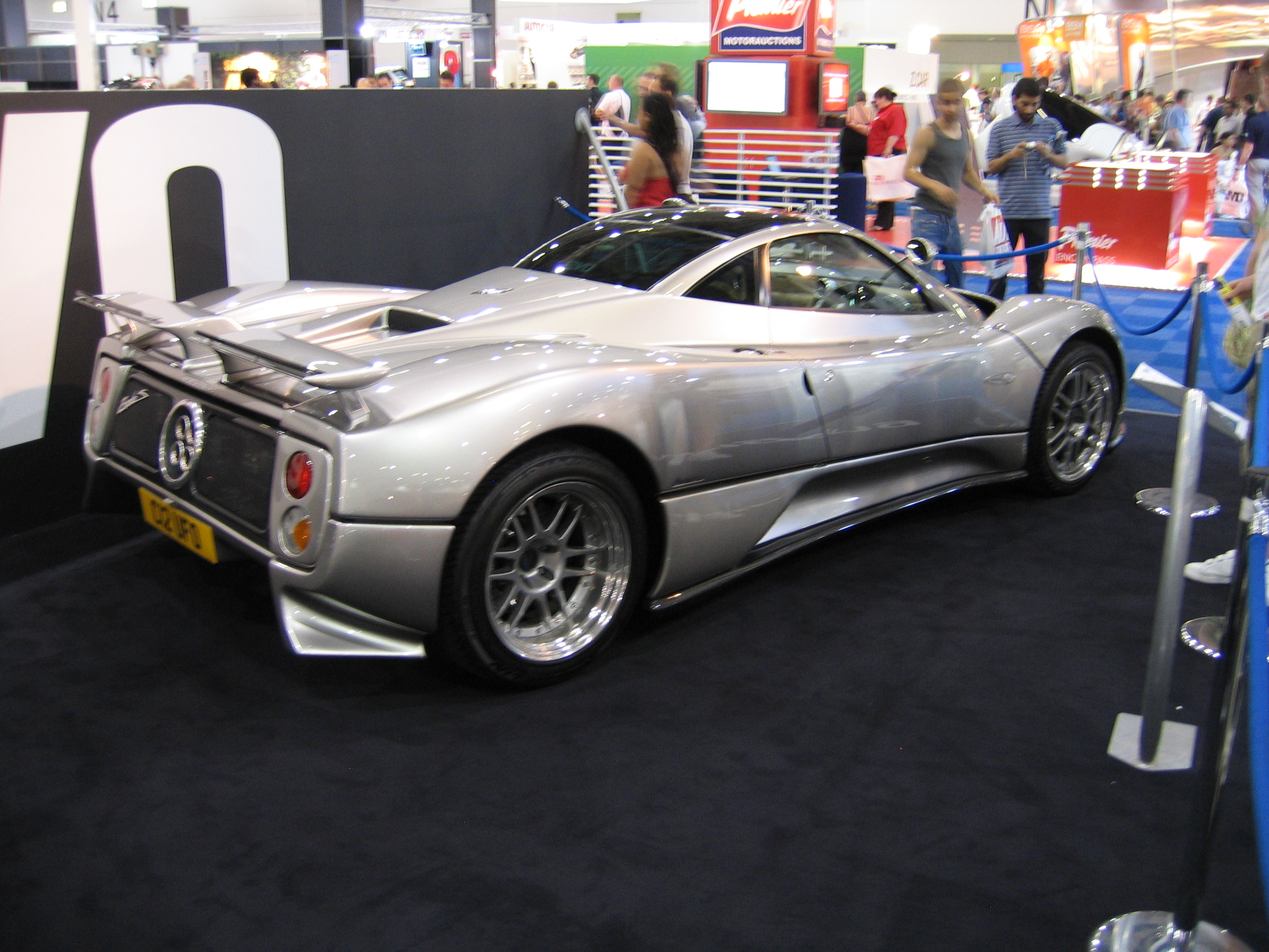 Pagani Zonda